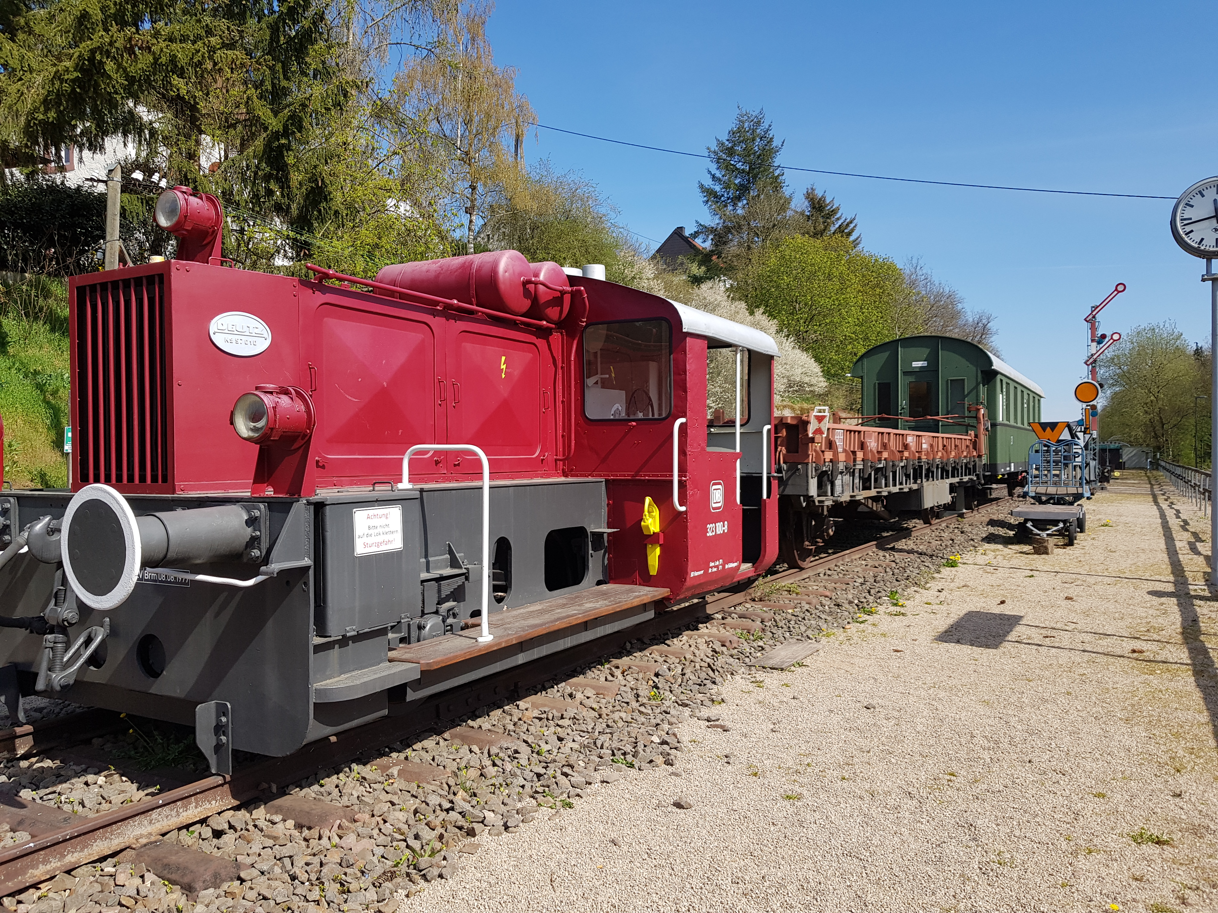 Blick auf das Eisenbahnfreilichtmuseum beim ehem. Bahnhof Pronsfeld